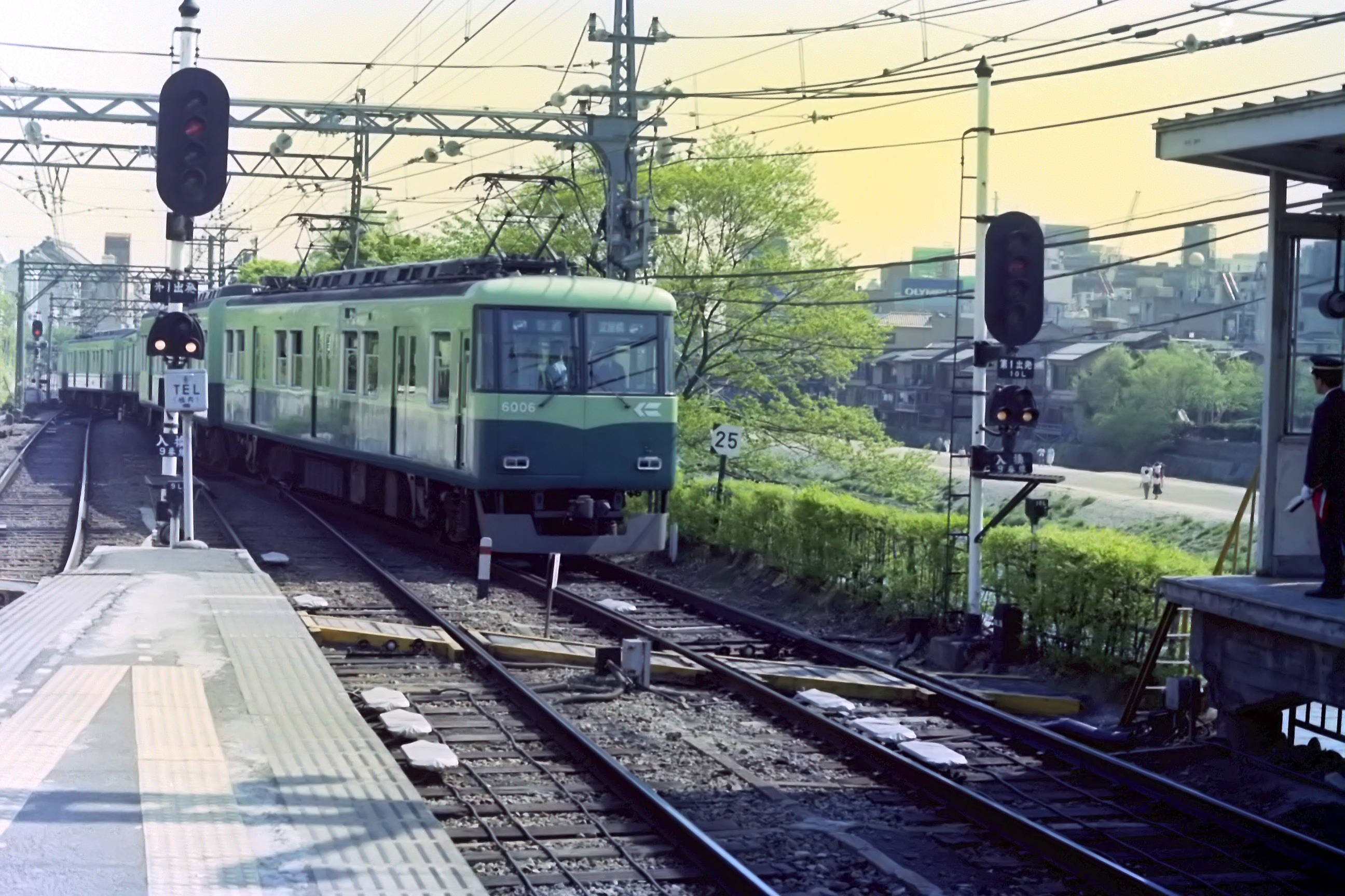 地上時代の三条駅に到着する6000系